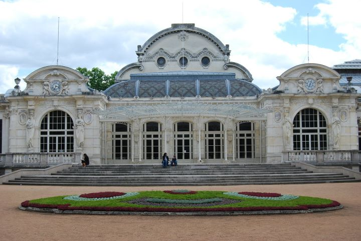 le Façade de Palais du congrès Vichy (et l'opéra)